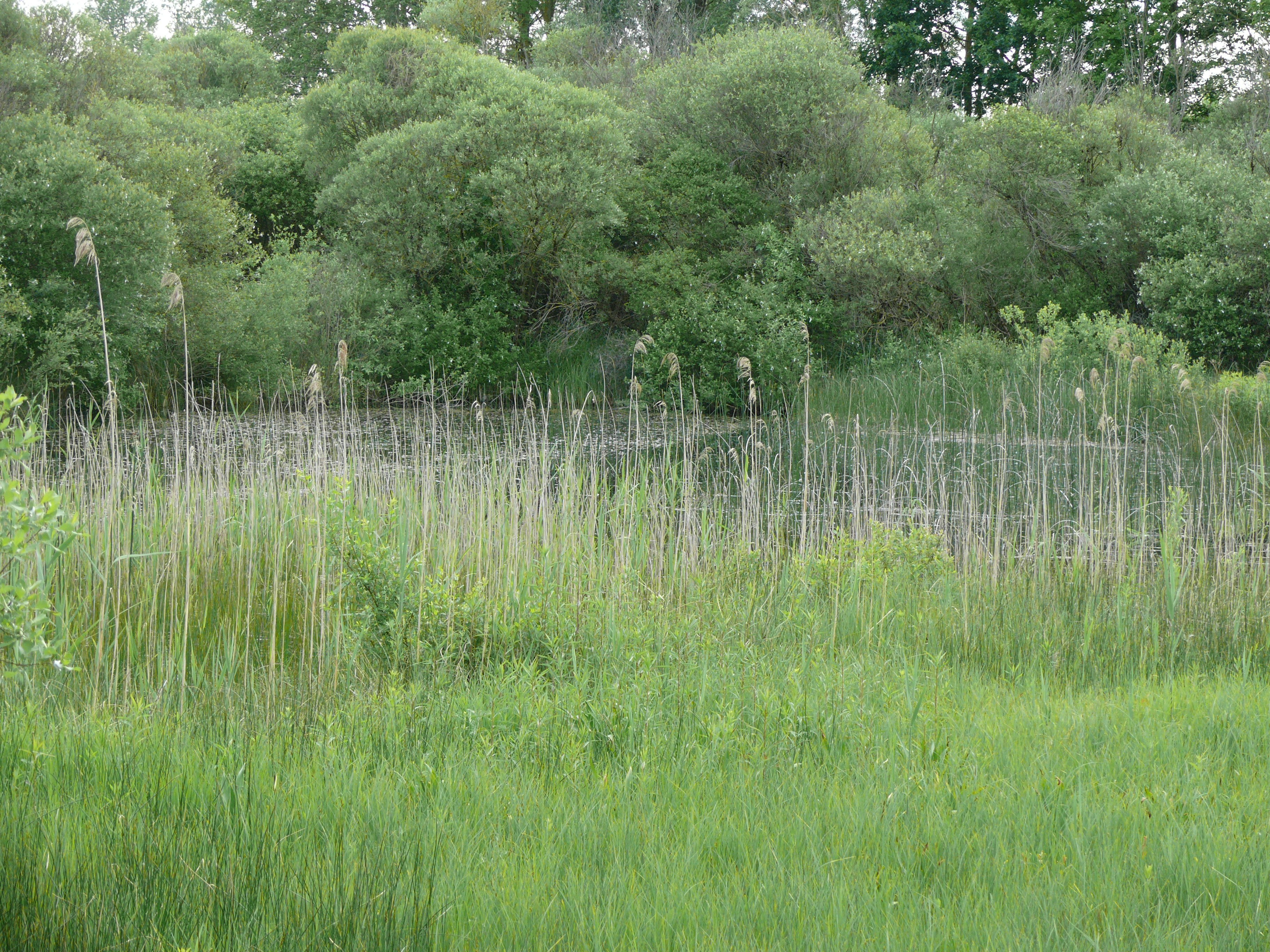 Weiher im Naturschutzgebiet Viehlaßmoos, östlicher Teil zwischen A92 und Sempt-Flutkanal , Landkreis Erding, Bayern, Deutschland